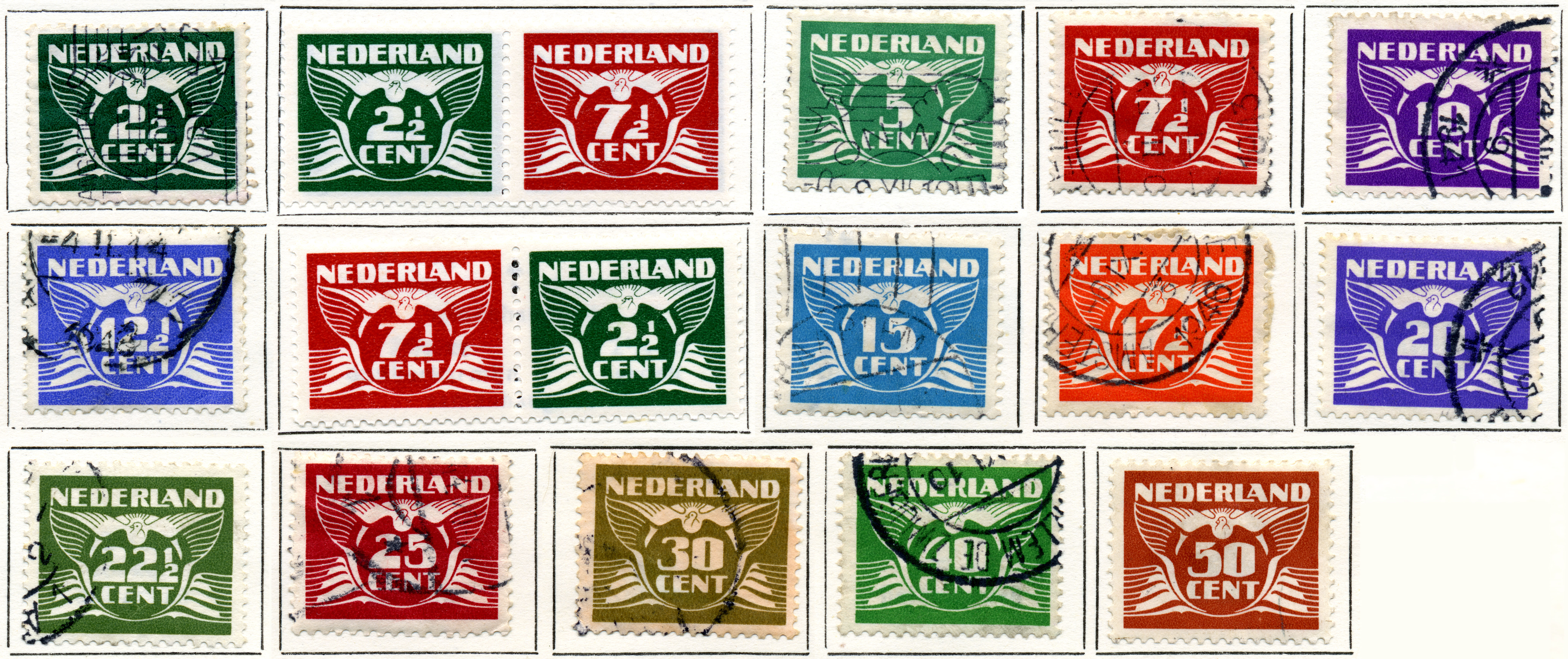 Vliegende duif. Watermerk ringen vertikaal (1941). NVPH nr 379-391. Ontwerp van Chris Lebeau